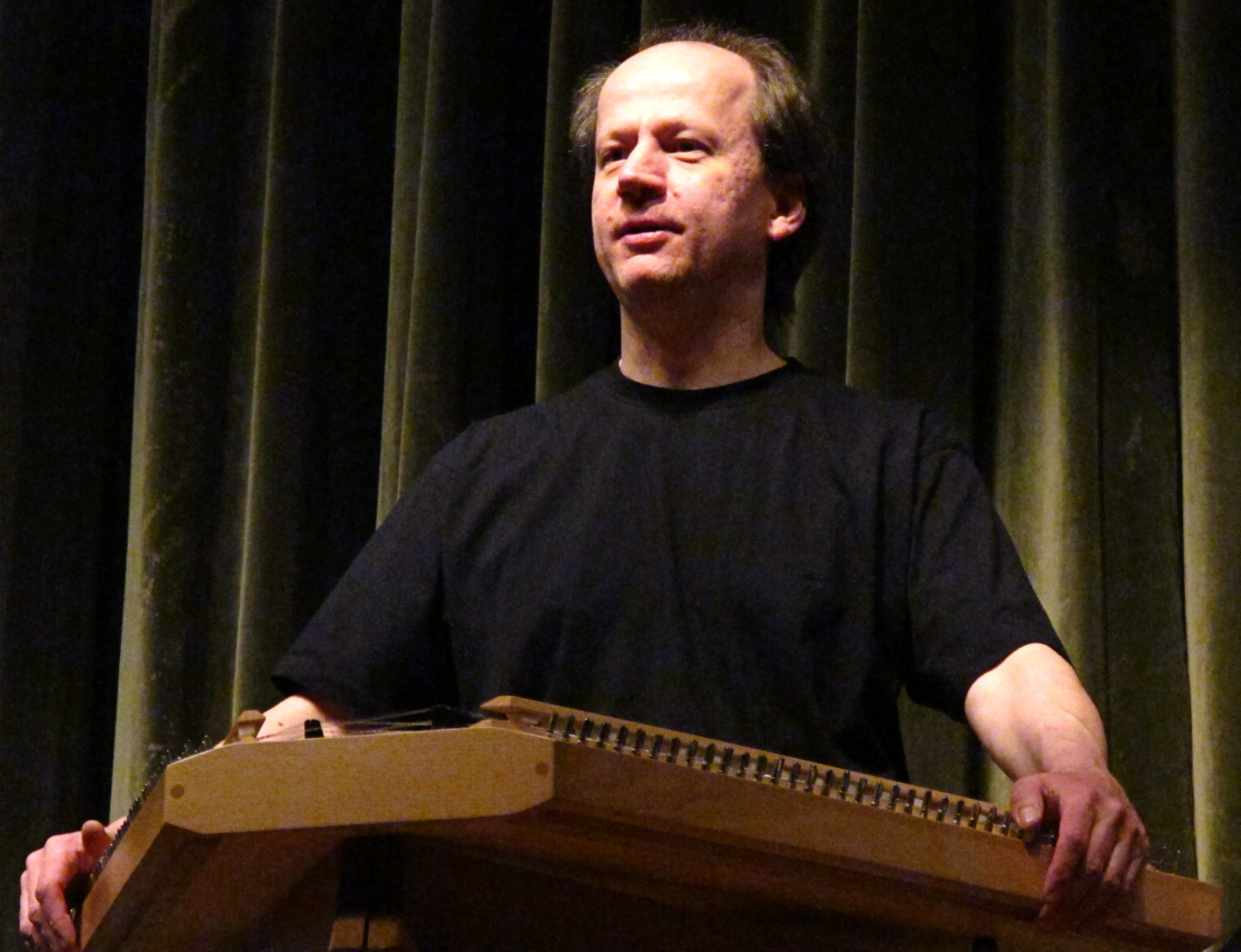 Hackbrettspieler Rudi Zapf bei einem Konzert im Dezember 2010 in Holzkirchen